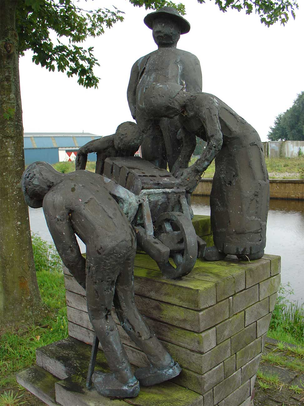 "De veenarbeiders" door Jef Depassé - Eexterveenschekanaal